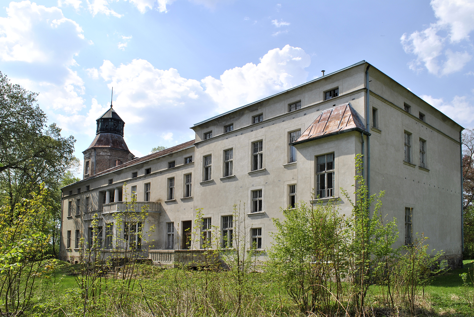 Pałac w Żelmowie